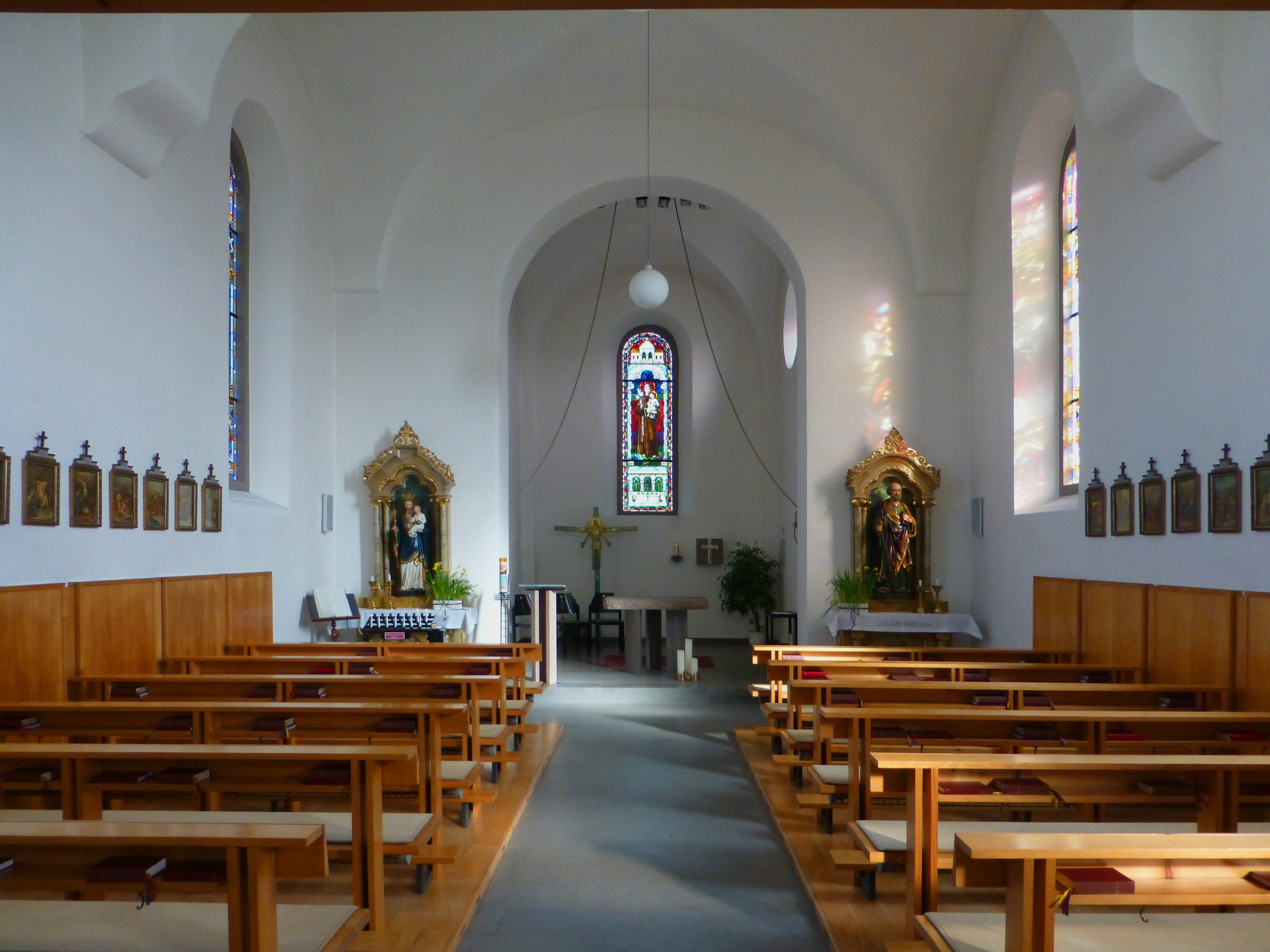 Innenansicht der St. Antoniuskapelle in Lustenau